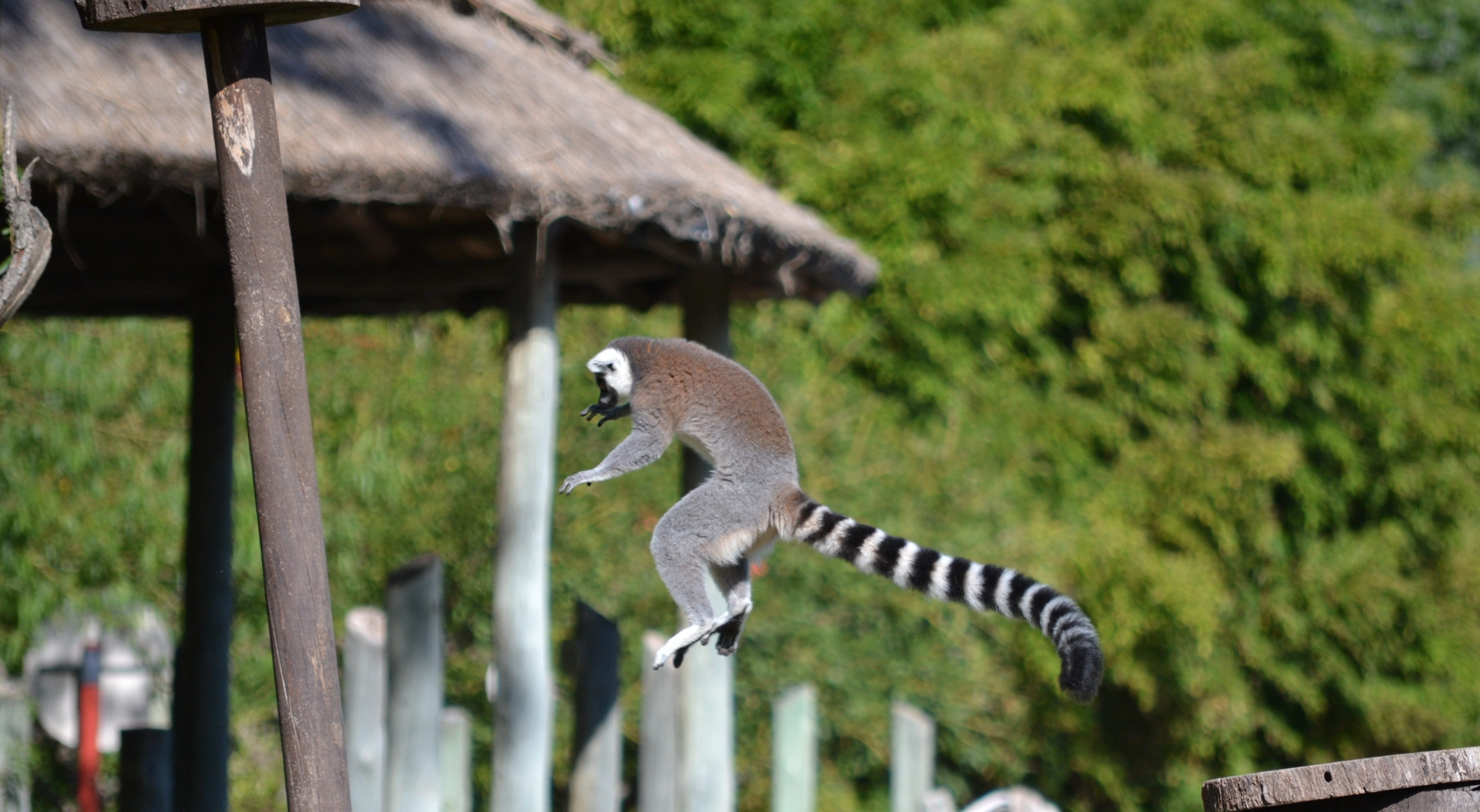 Ejemplo del salto de un lemur